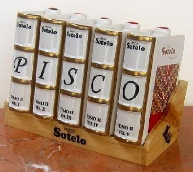 Miniaturas de Pisco - Producto Peruano